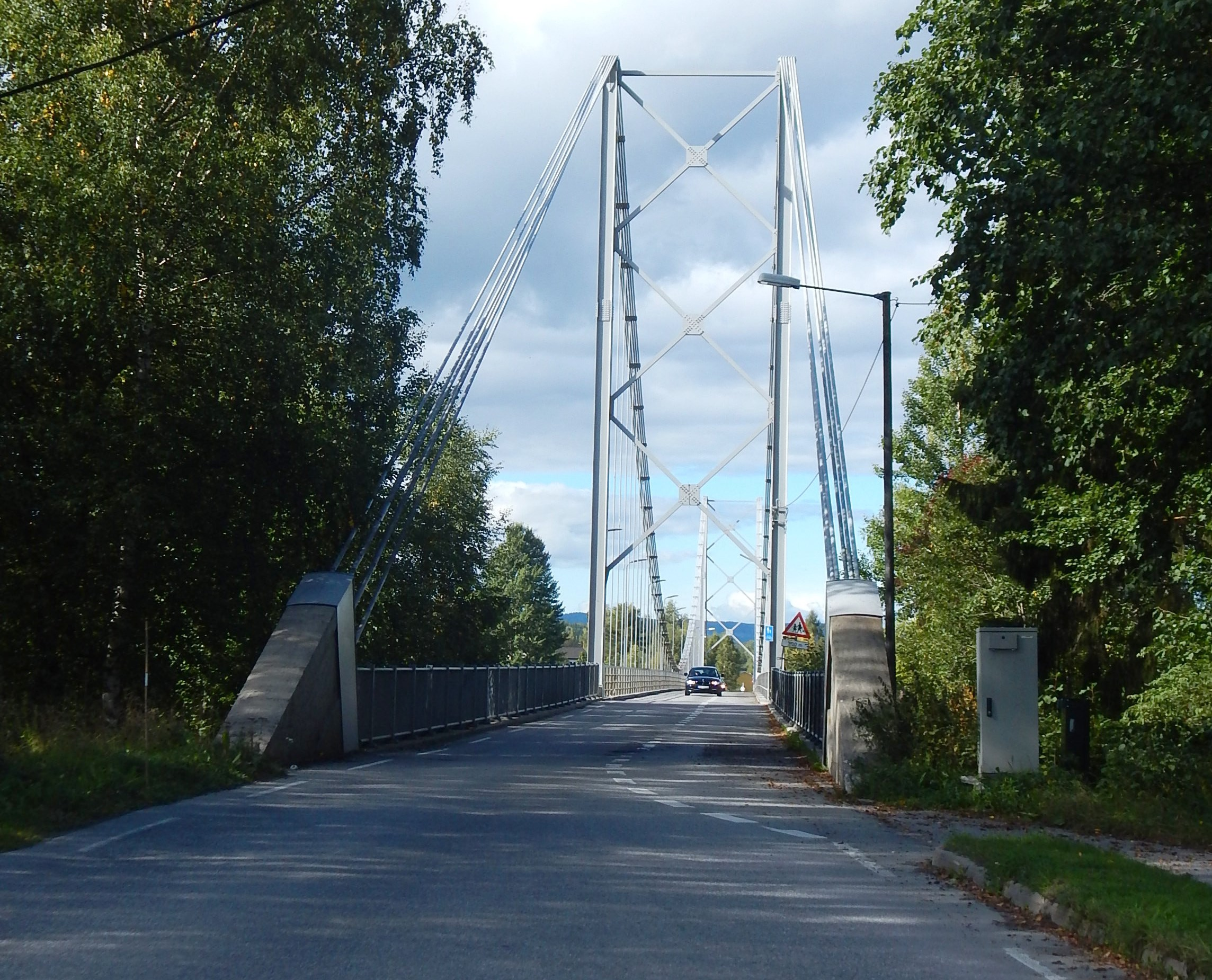 Bruvegen (fylkesvei 370) over Brandval hengebru østfra